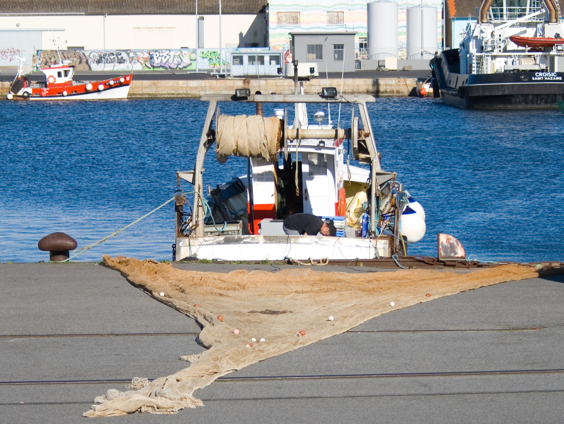 Chalutier et chalut à Saint-Nazaire.